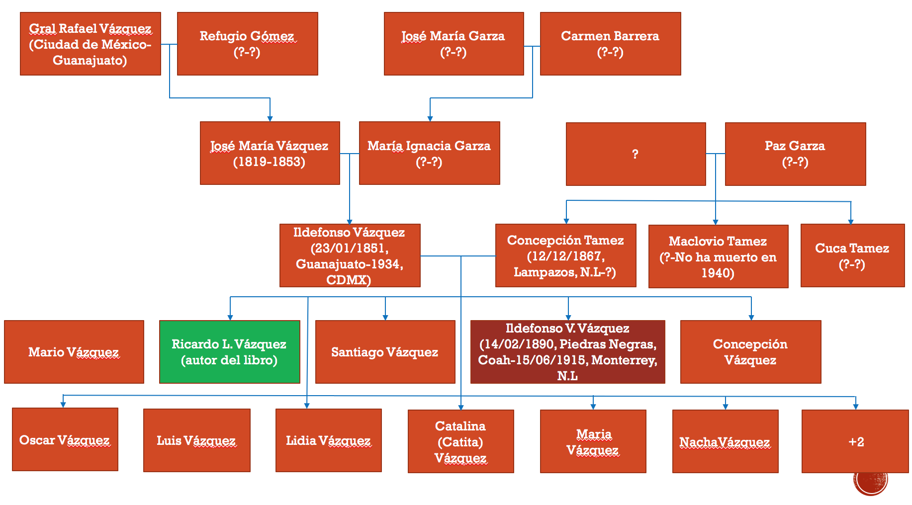 Este es el árbol genealógico del General Ildefonso Valentín Vázquez.